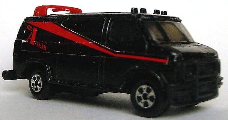 Ertl GMC van uit The A-Team